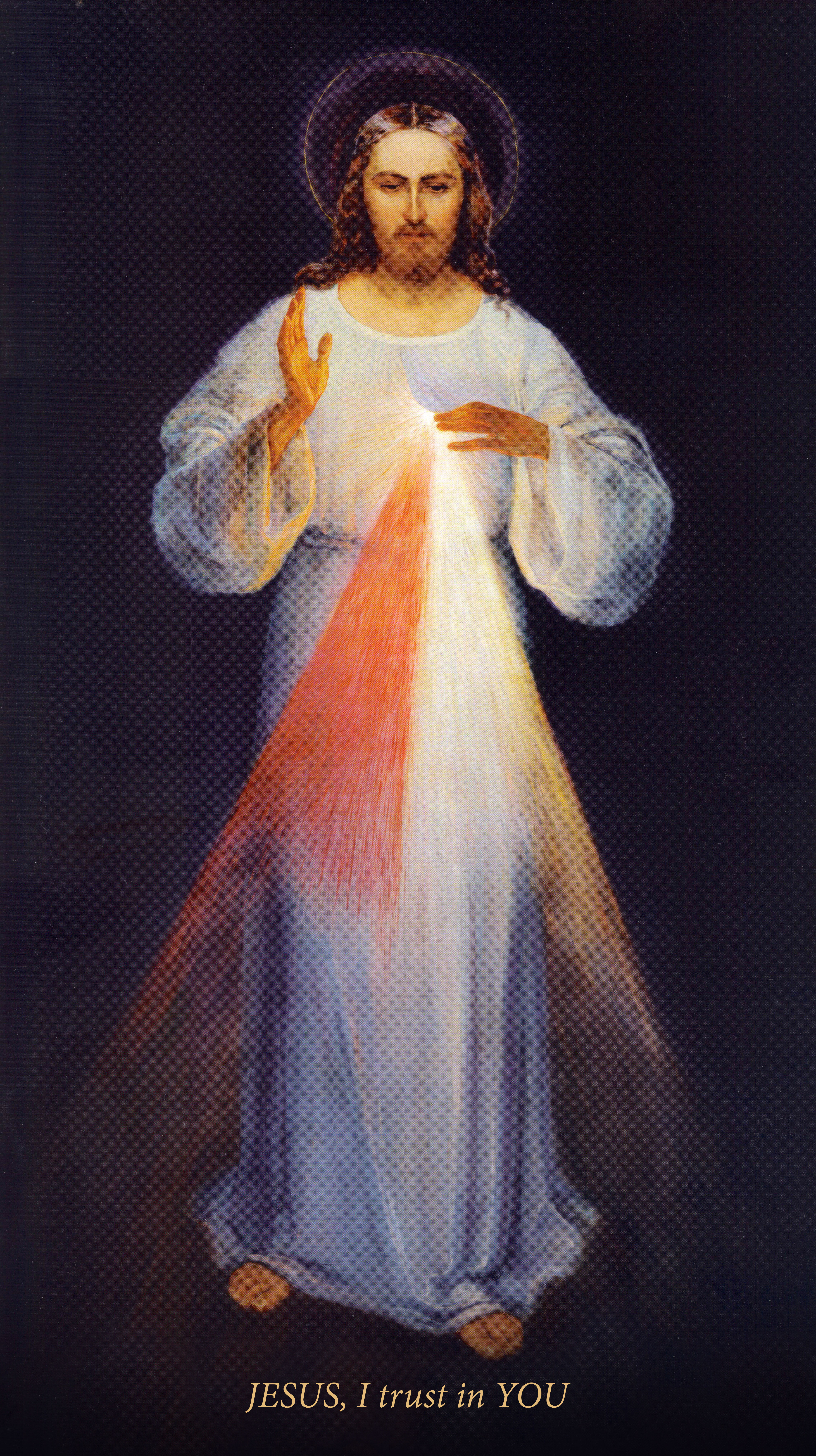 Original painting of the Divine Mercy (by Eugeniusz Kazimirowski in 1934). This is the only painting which was done under the indications of Sister Faustina when she was still alive, unlike the painting by Adolf Hyła which was done in 1943 after Saint Faustina's death in 1938 but still the most known.